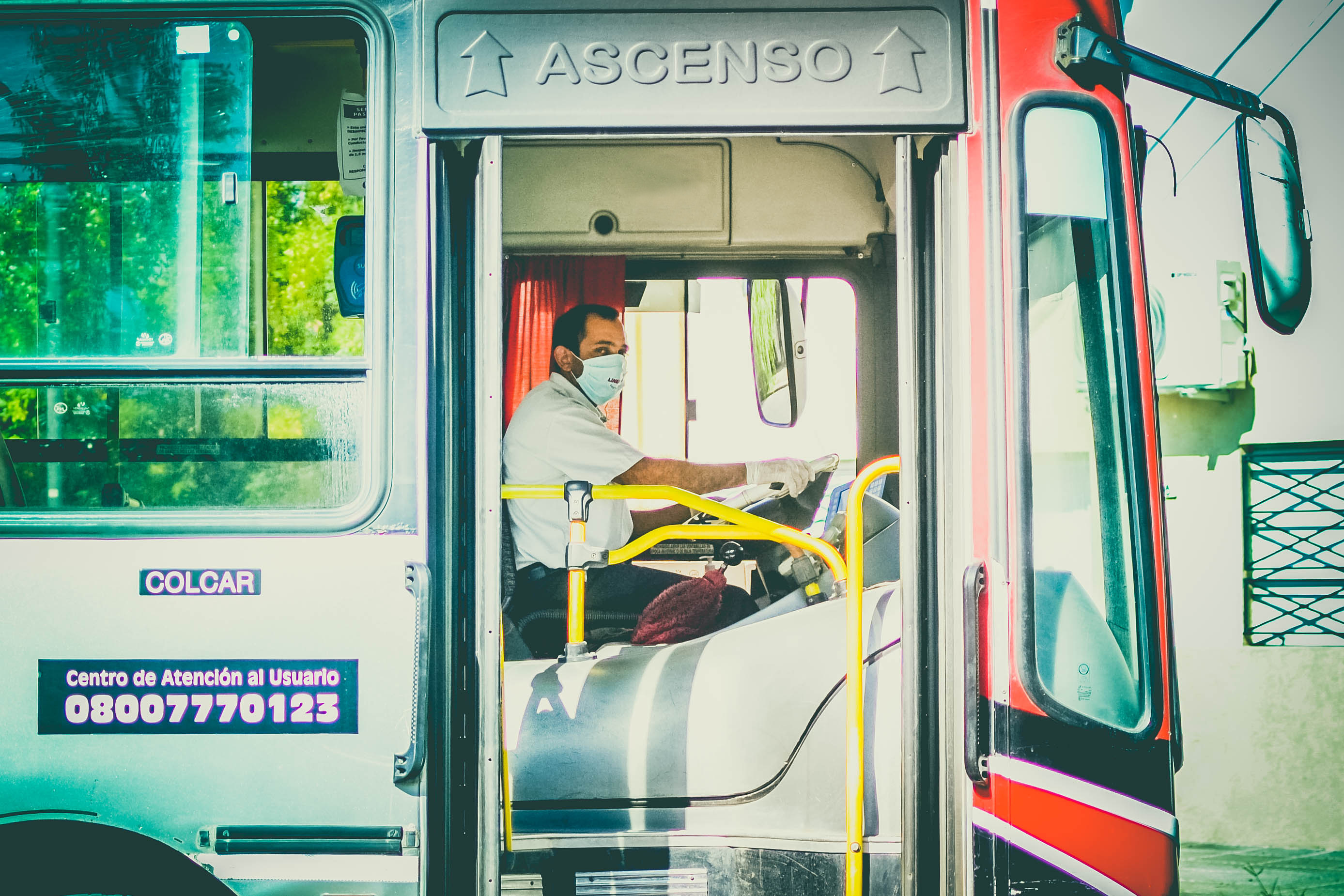 Cuarentena titi nicola covid 2019 coronavirus argentina aislamiento